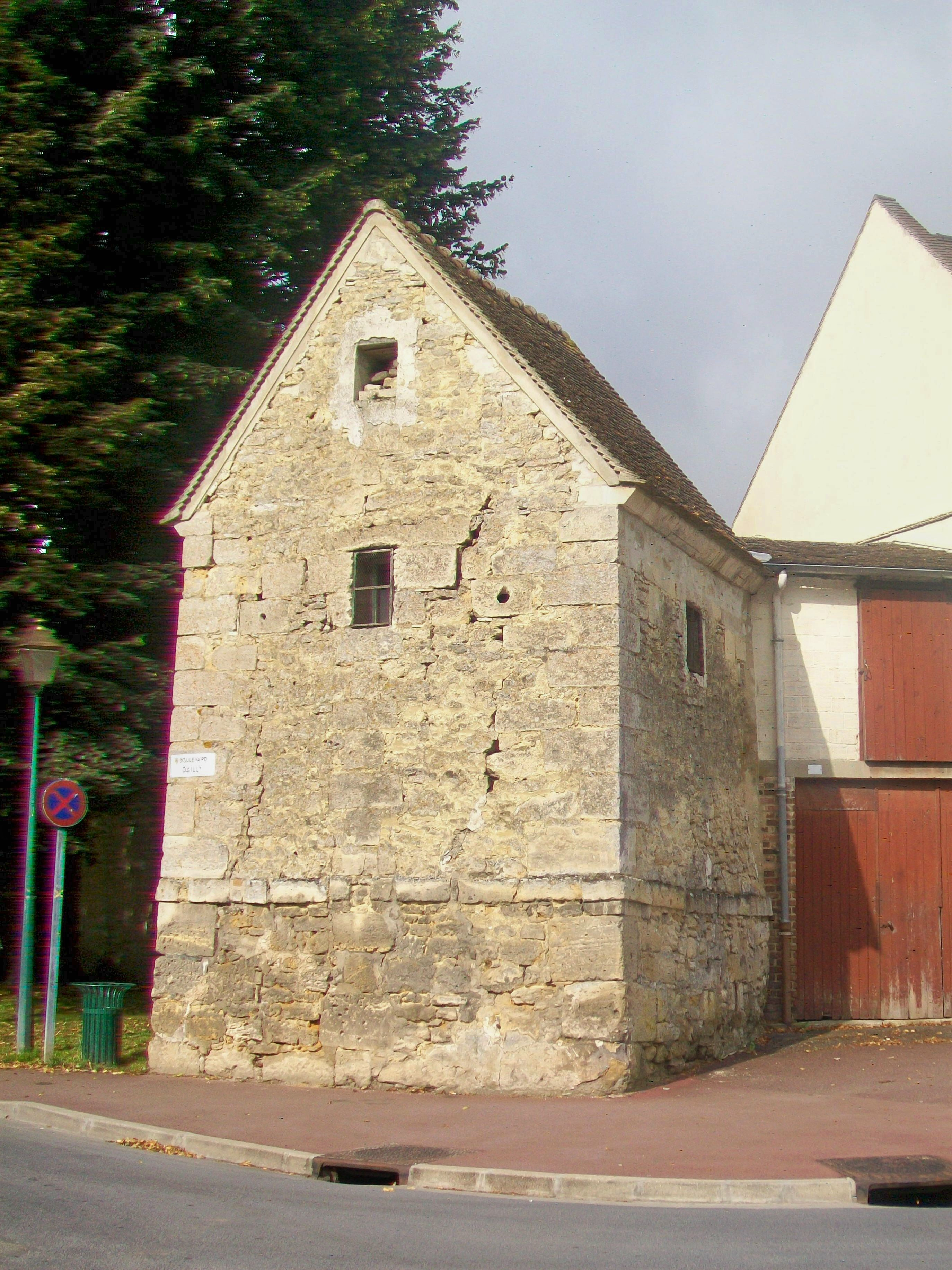 La tour des Cordeliers, 18 boulevard des Cordeliers, en face de la gare routière.